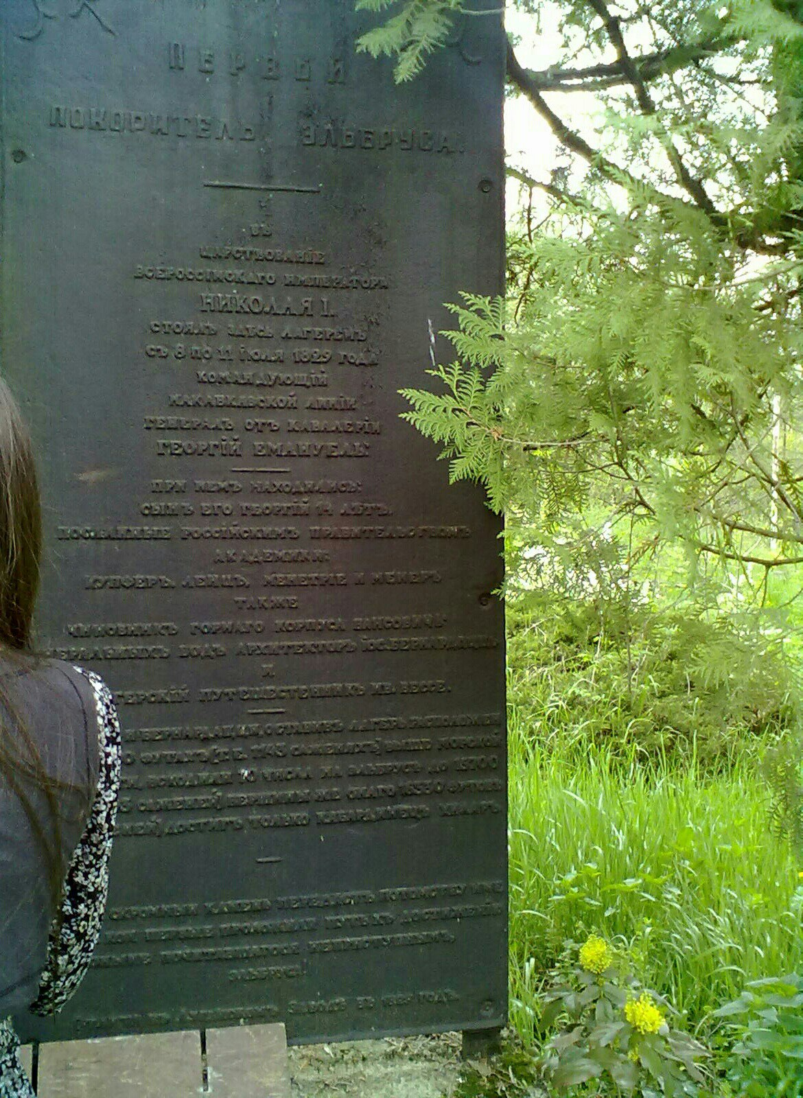 Памятник первому документально известному покорителю Эльбруса.